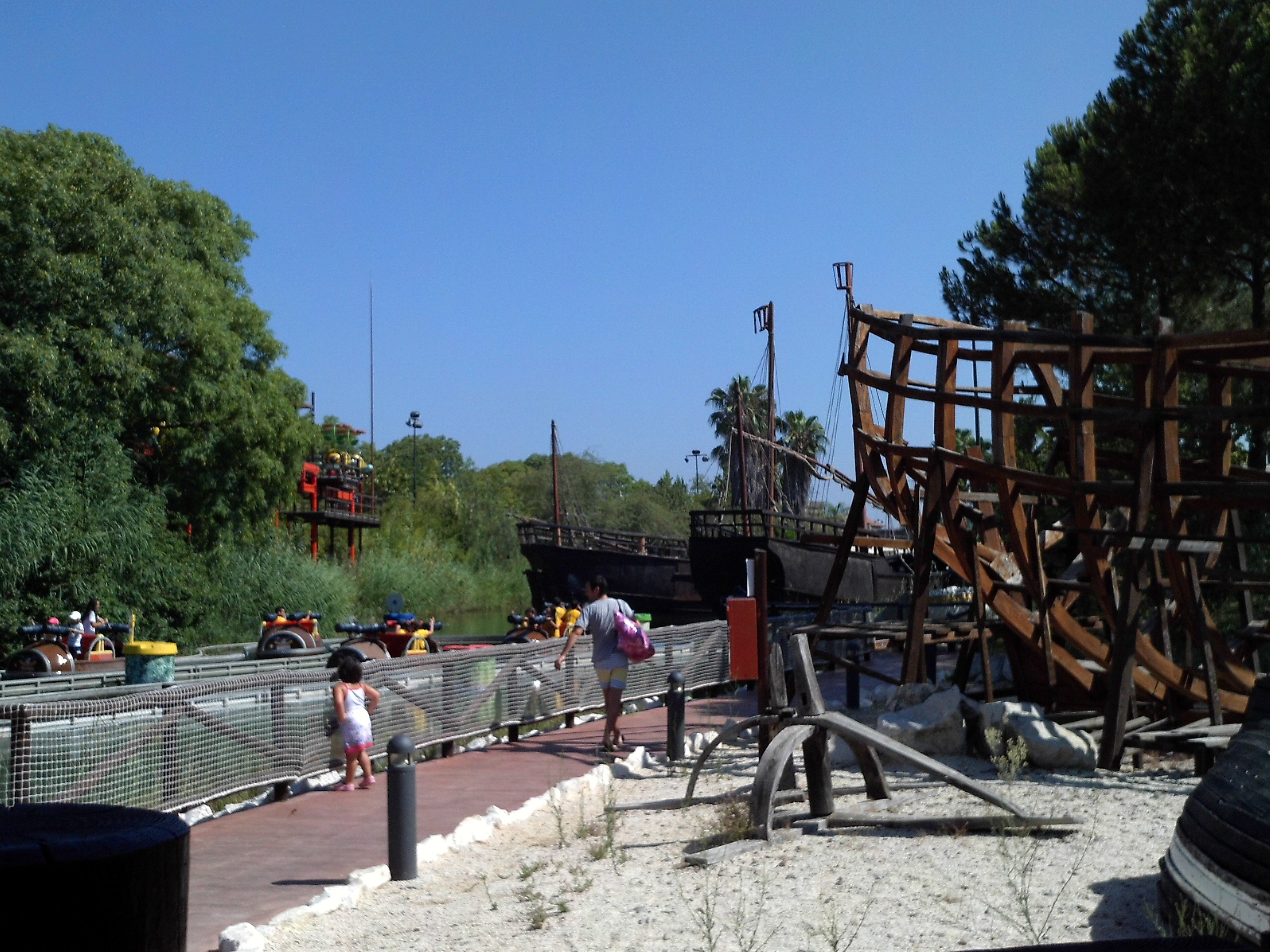 Atracción llamada Los Bucaneros, en Isla Mágica, que consiste en disparar agua